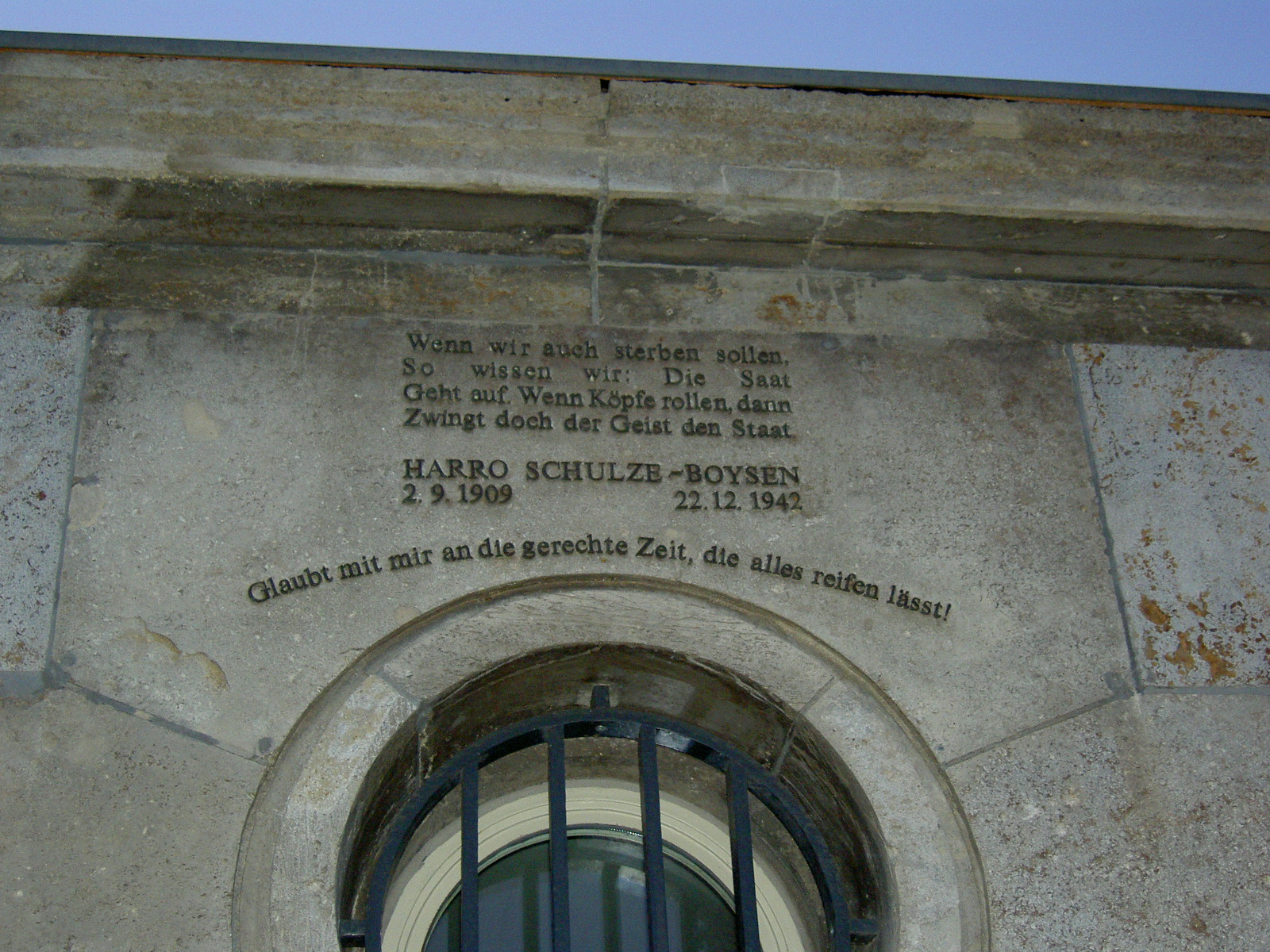 Zitat von Harro Schulze-Boysen am Finanzministerium in Berlin